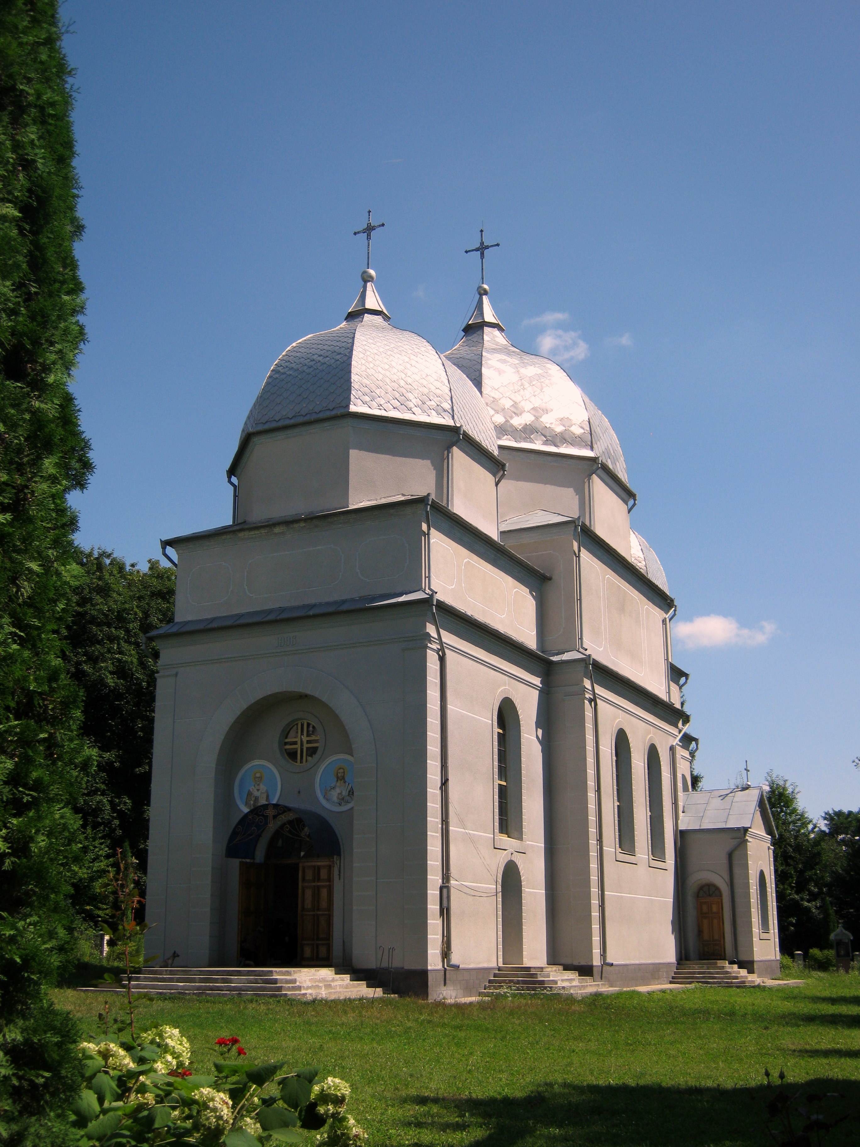 Церква в селі Дністрове Борщівського району Тернопільської області (вигляд спереду)